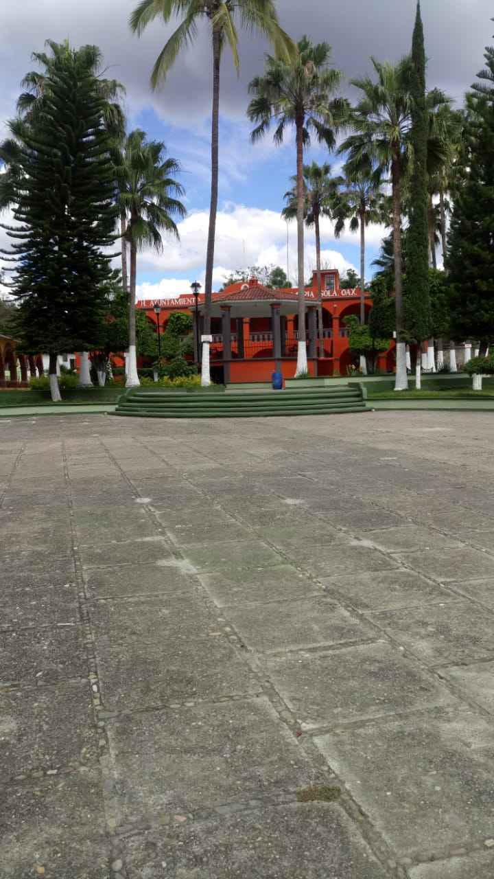 Foto Tomada al parque de Santa María, el municipio al fondo.